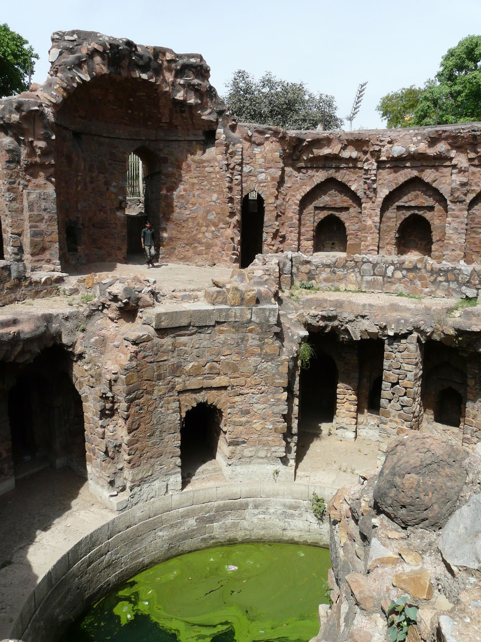 Baoli